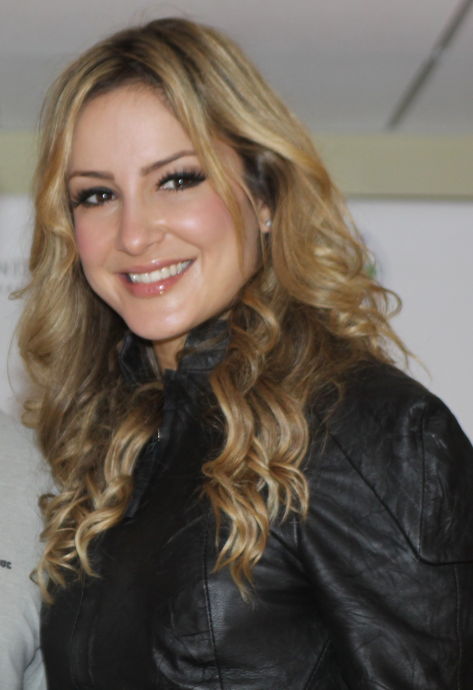 Cláudia Leitte no Brazilian Day em Miami.